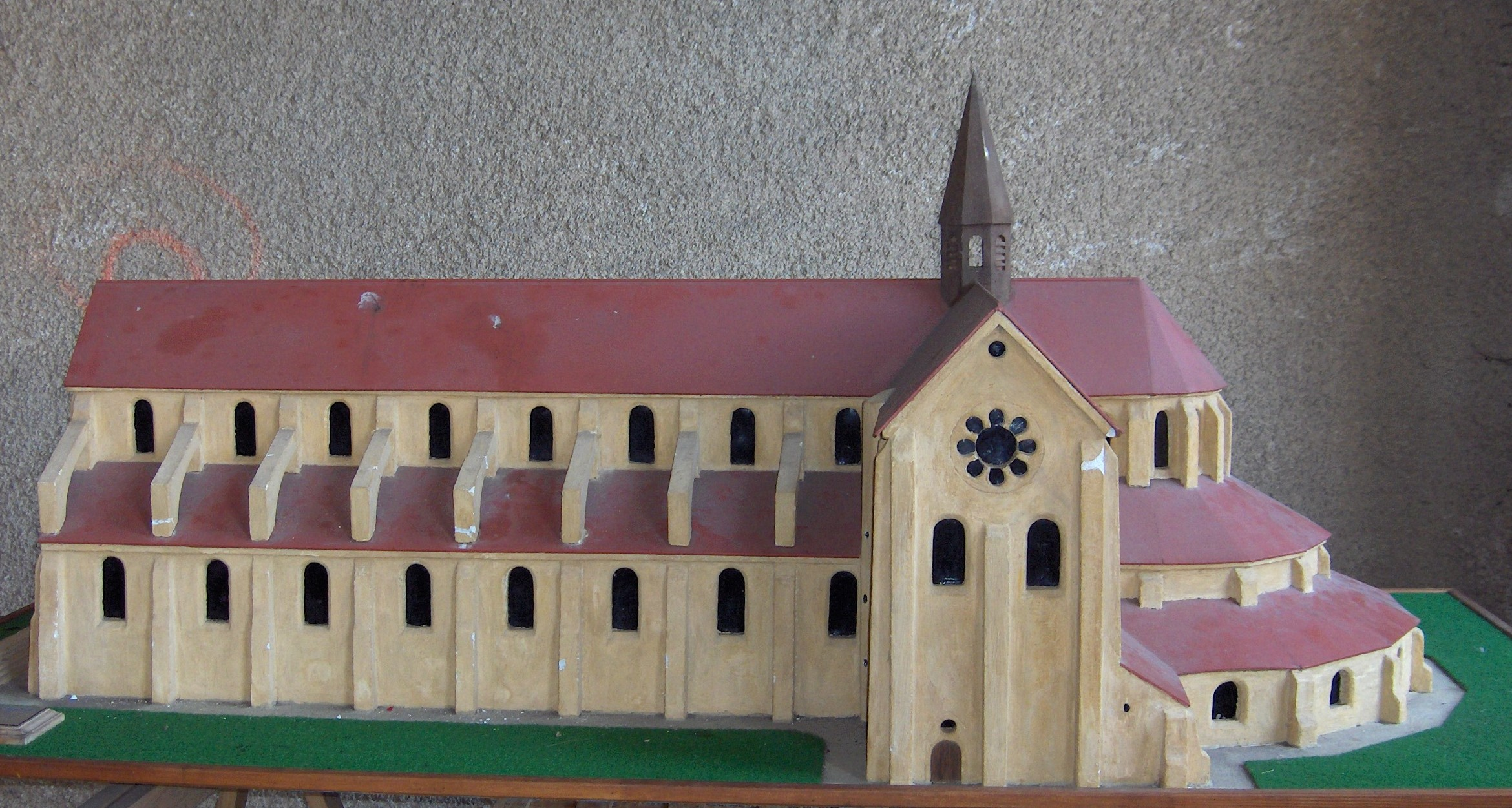 Maquette de l'église de Cherlieu de Messieurs Jacquet et Perlot, à l'échelle 1/50e, de 1998 élaborée à l'occasion du 9ème centenaire de l'abbaye